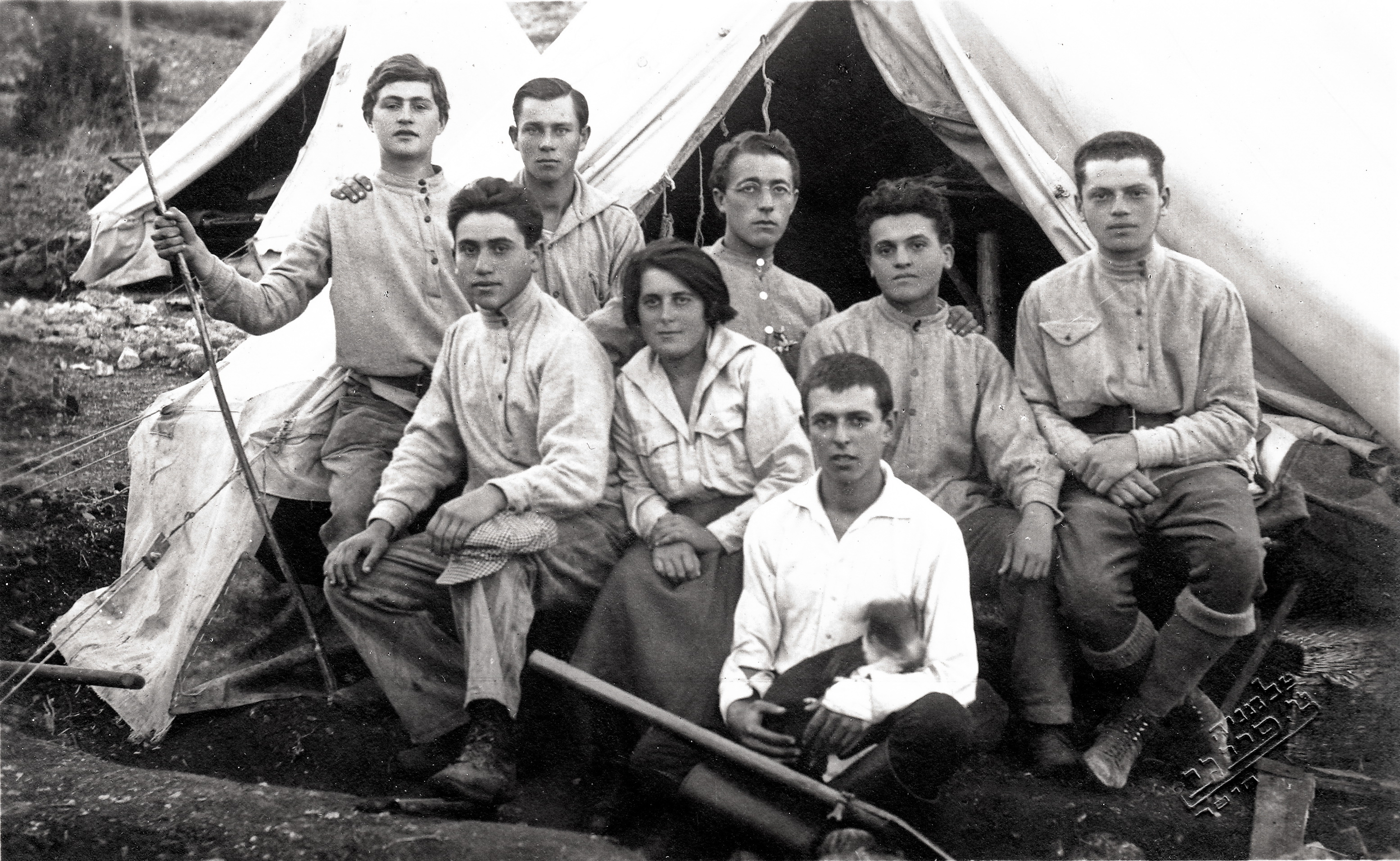 זאב איסרזון ראשון מימין. קבוצת יוצאי בוצ'אץ בגדוד העבודה. 1920 ראש העין